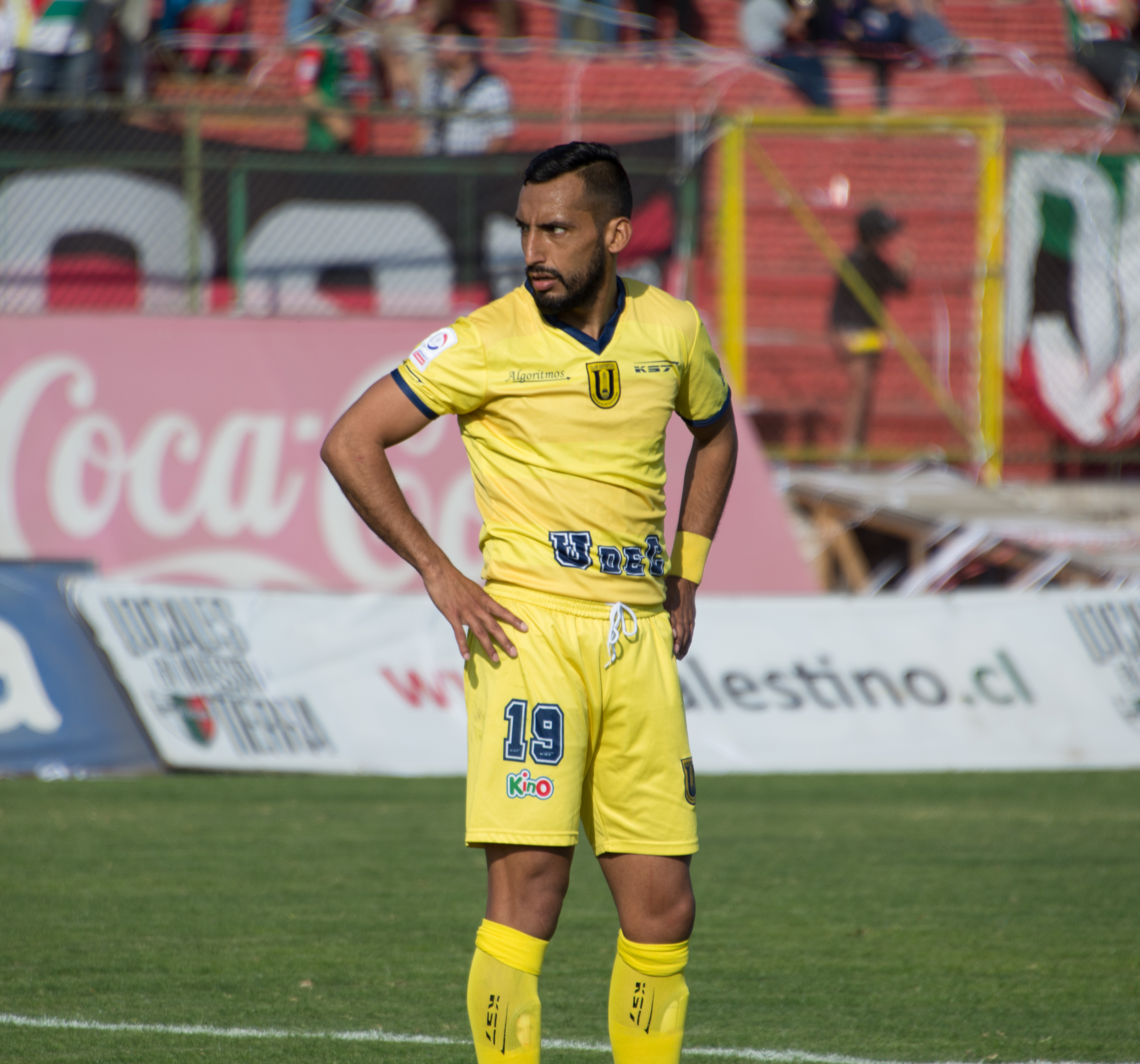 Ronald de la Fuente, Palestino v Universidad de Concepción, Estadio Municipal de La Cisterna, La Cisterna, Santiago, Chile.